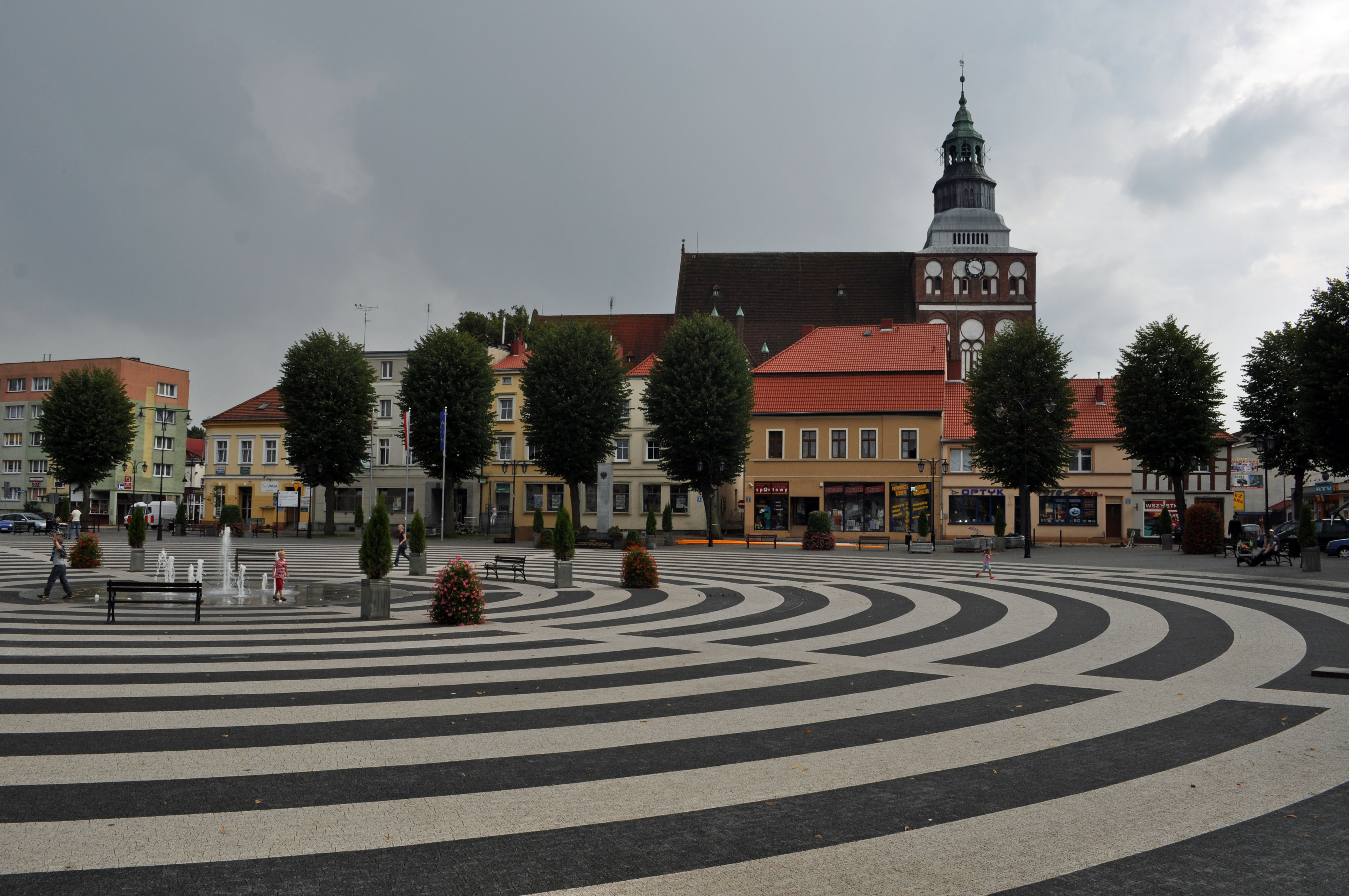 Gryfice (Powiat Gryficki), i (2011-08-05) by Klugschnacker in Wikipedia